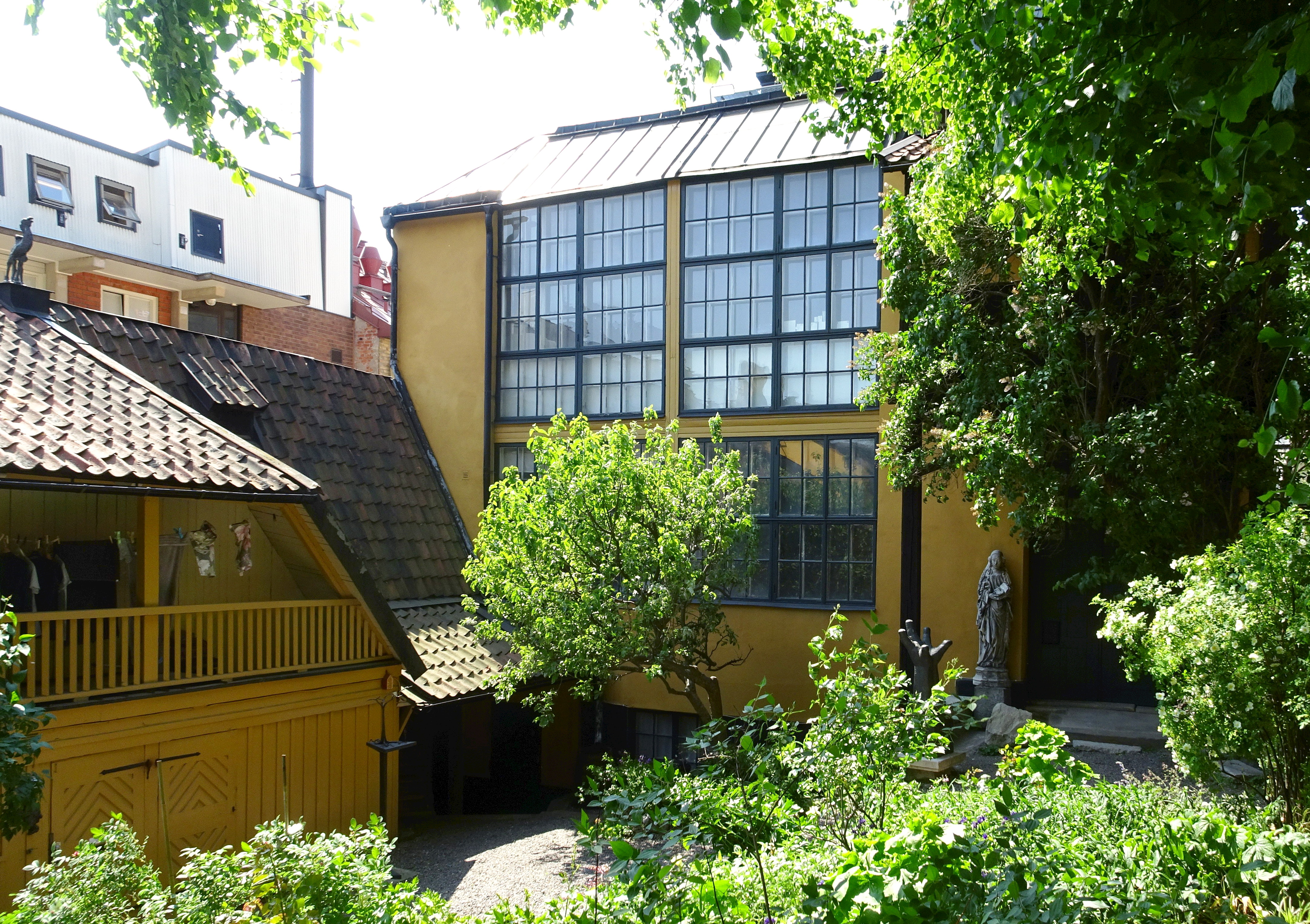 Nederland mindre 9, gårdsmiljön. Här på Maria Prästgårdsgata 3 på Södermalm i fastigheten Nederland mindre 9 bodde bildhuggaren Christian Eriksson, som här skapade ett hem och en arbetsmiljö med en ateljé för sig och flera kolleger. Christian Eriksson köpte fastigheten 1905.